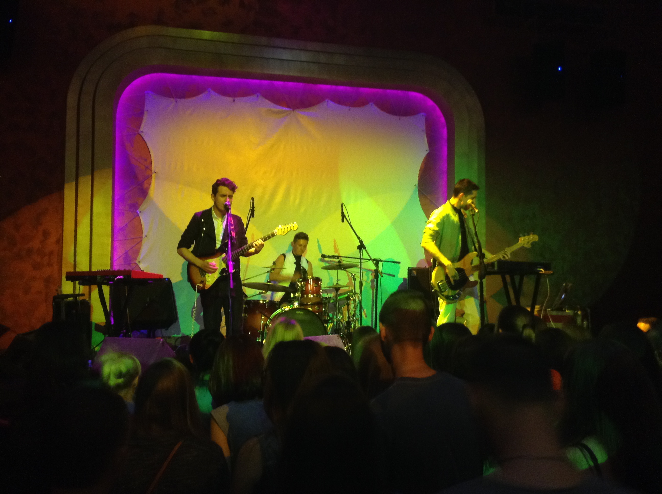 Сольний концерт Brunettes Shoot Blondes у криворізькому клубі Sky.